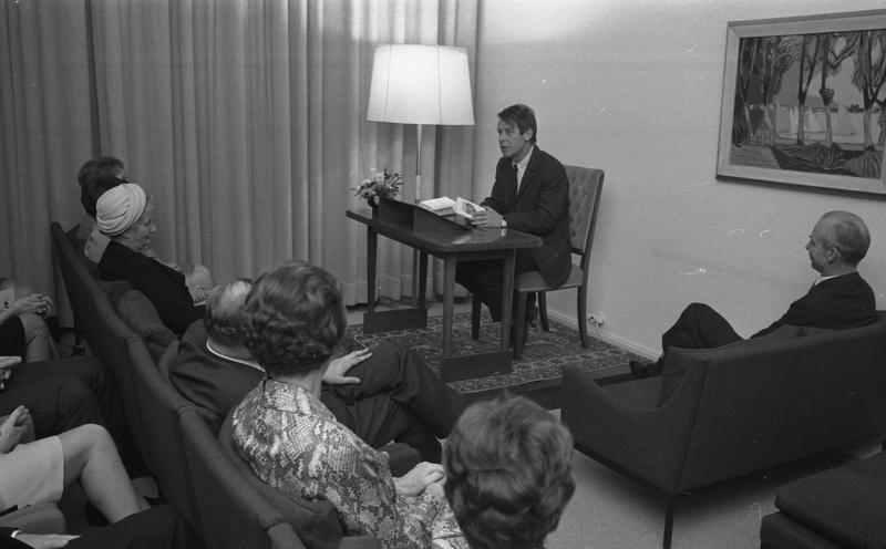 Dichterlesung Siegfried Lenz in der Landesvertr. Hamburg